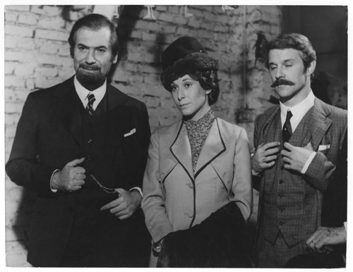 Los actores Arturo García Buhr, Alejandra Da Passano y Adrián Ghio en la película argentina La Madre María (1974).